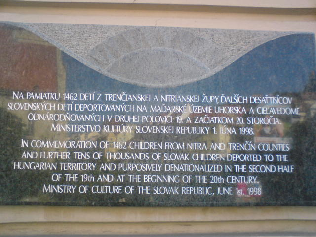 Pamätná tabuľa ma pamiatku 1462 deportovaných detí do Maďarska na cieľavedomé odnárodňovanie.